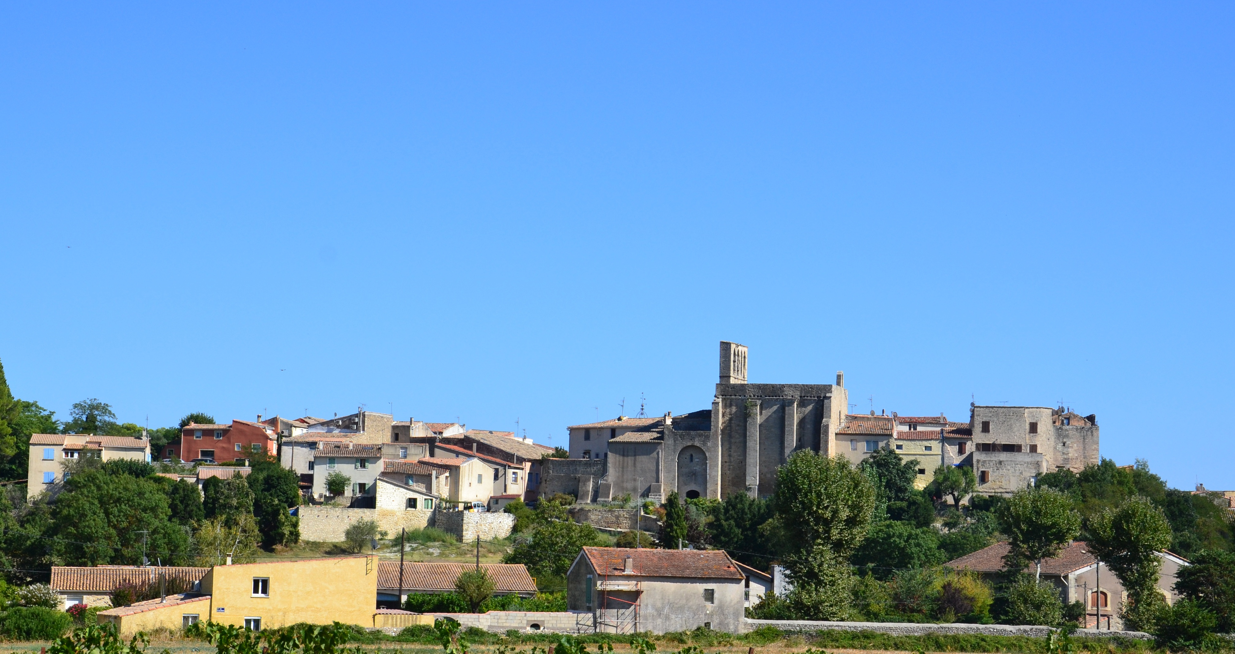 Vue sur le vieux village de Montbazin (Hérault).